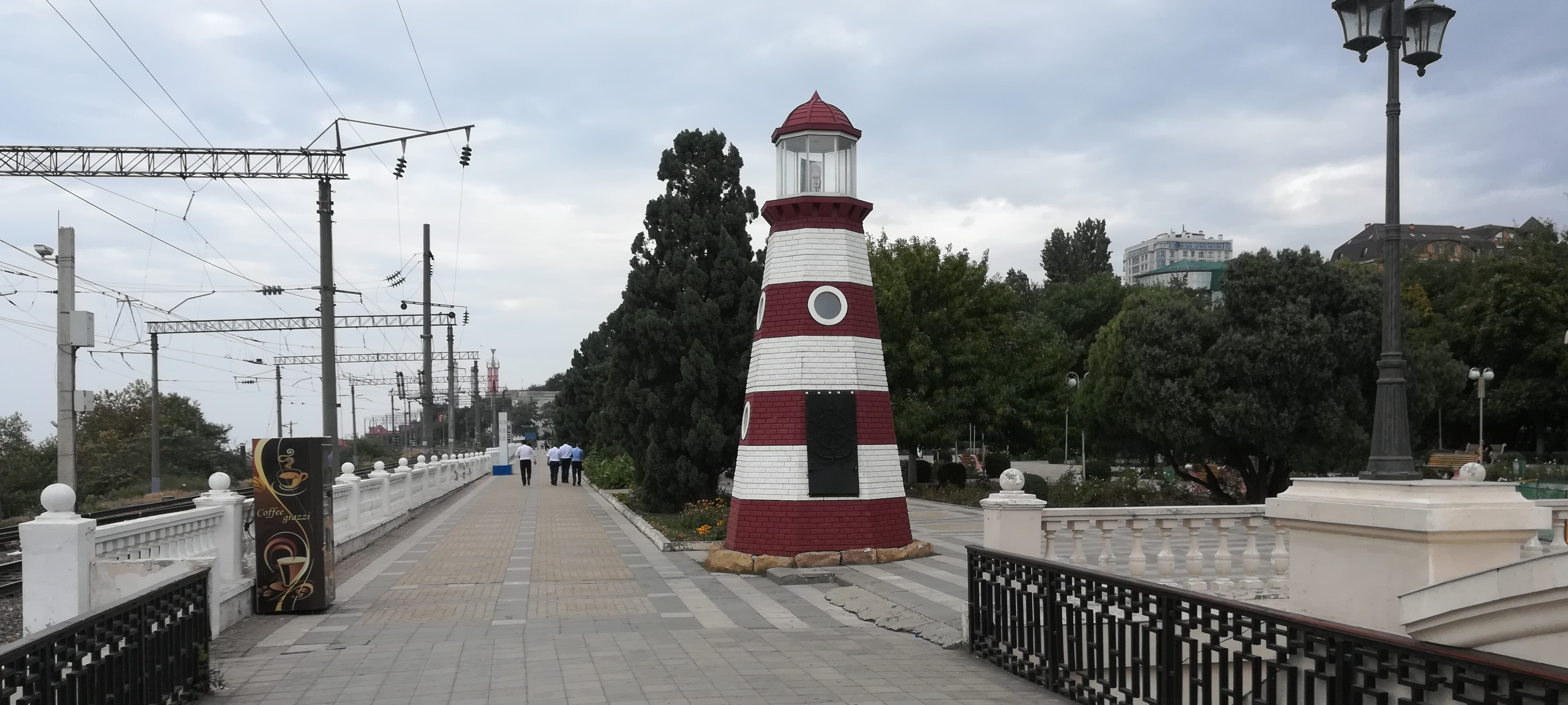 Махачкала